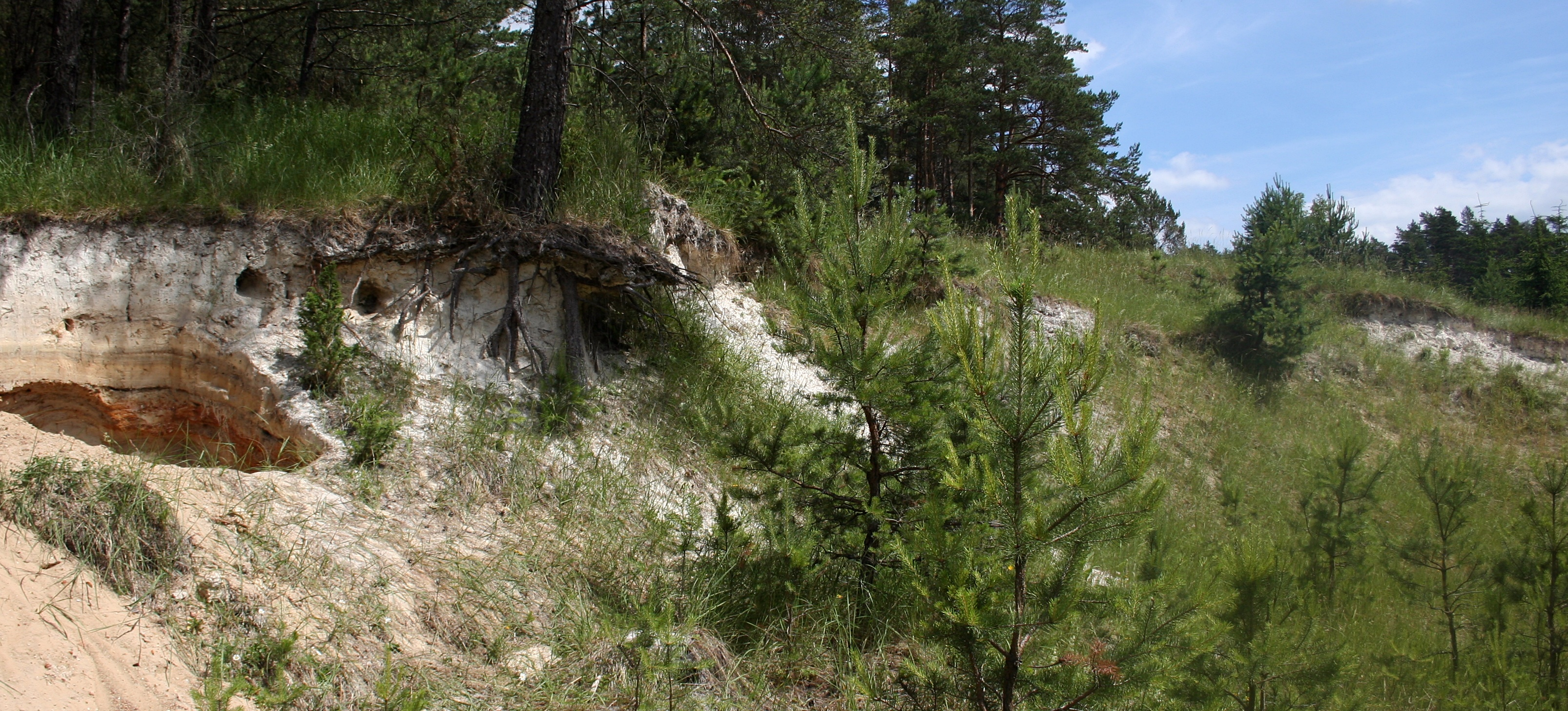 Zaborski Park Krajobrazowy, złoża kredy w Dolinie Kulawy